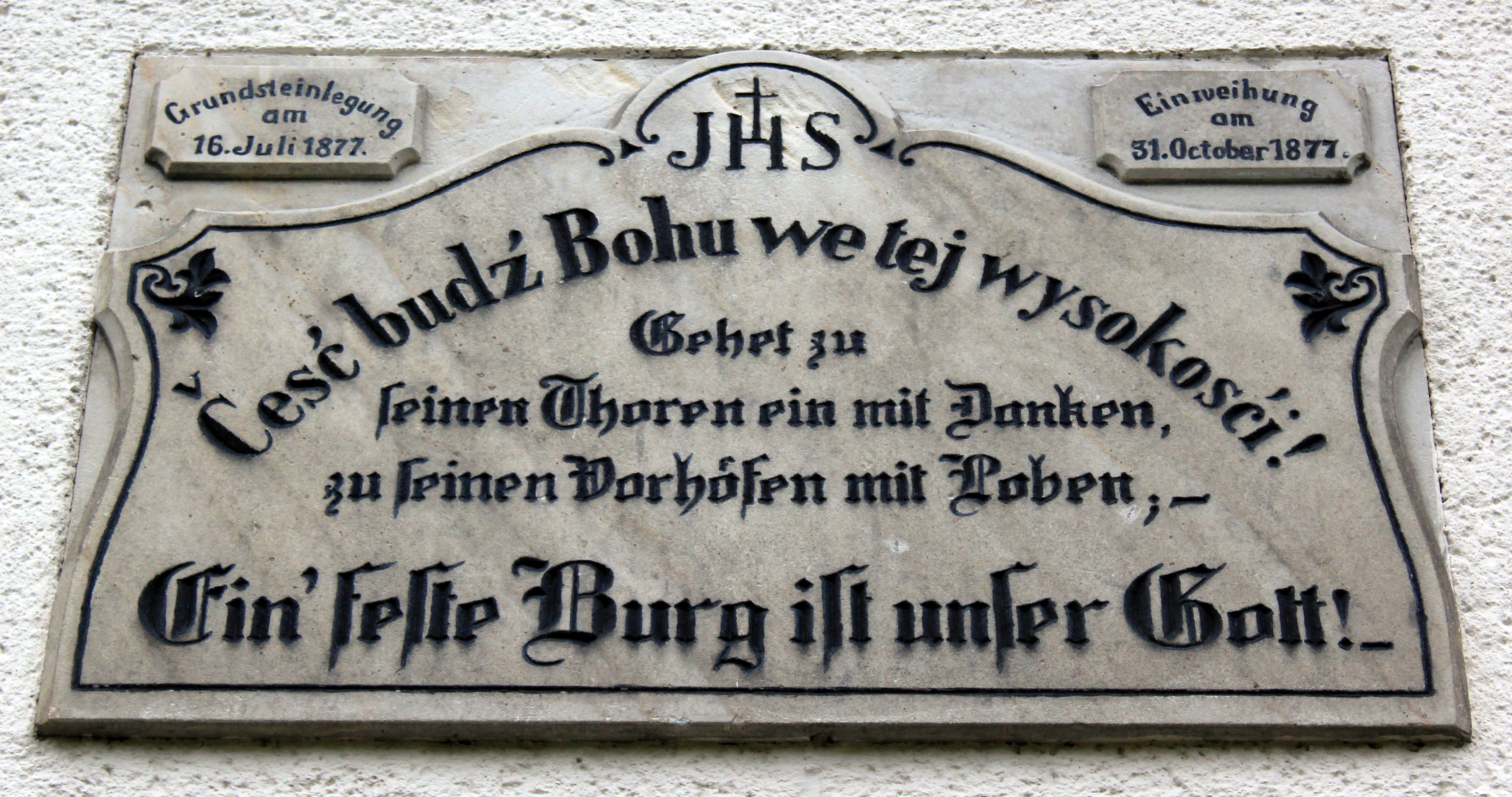 Hornjoserbsce: Dwurěčna tafla nad zachodom starolutherskeje cyrkwje we Wukrančicach.